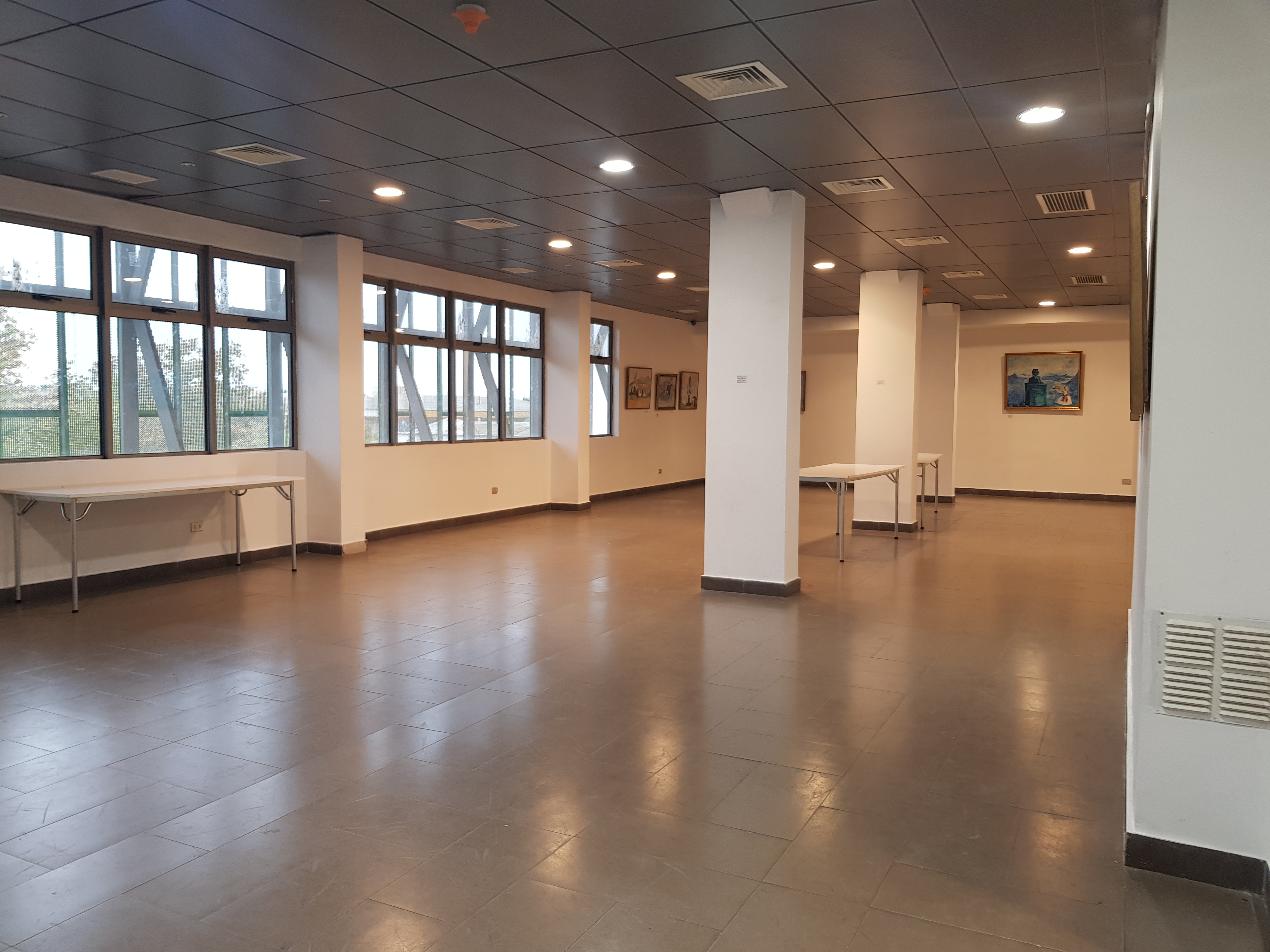 Fotografía tomada al área de exposiciones dentro del Centro Cultural Teatro Serrano de la Provincia de Melipilla, Región Metropolitana.